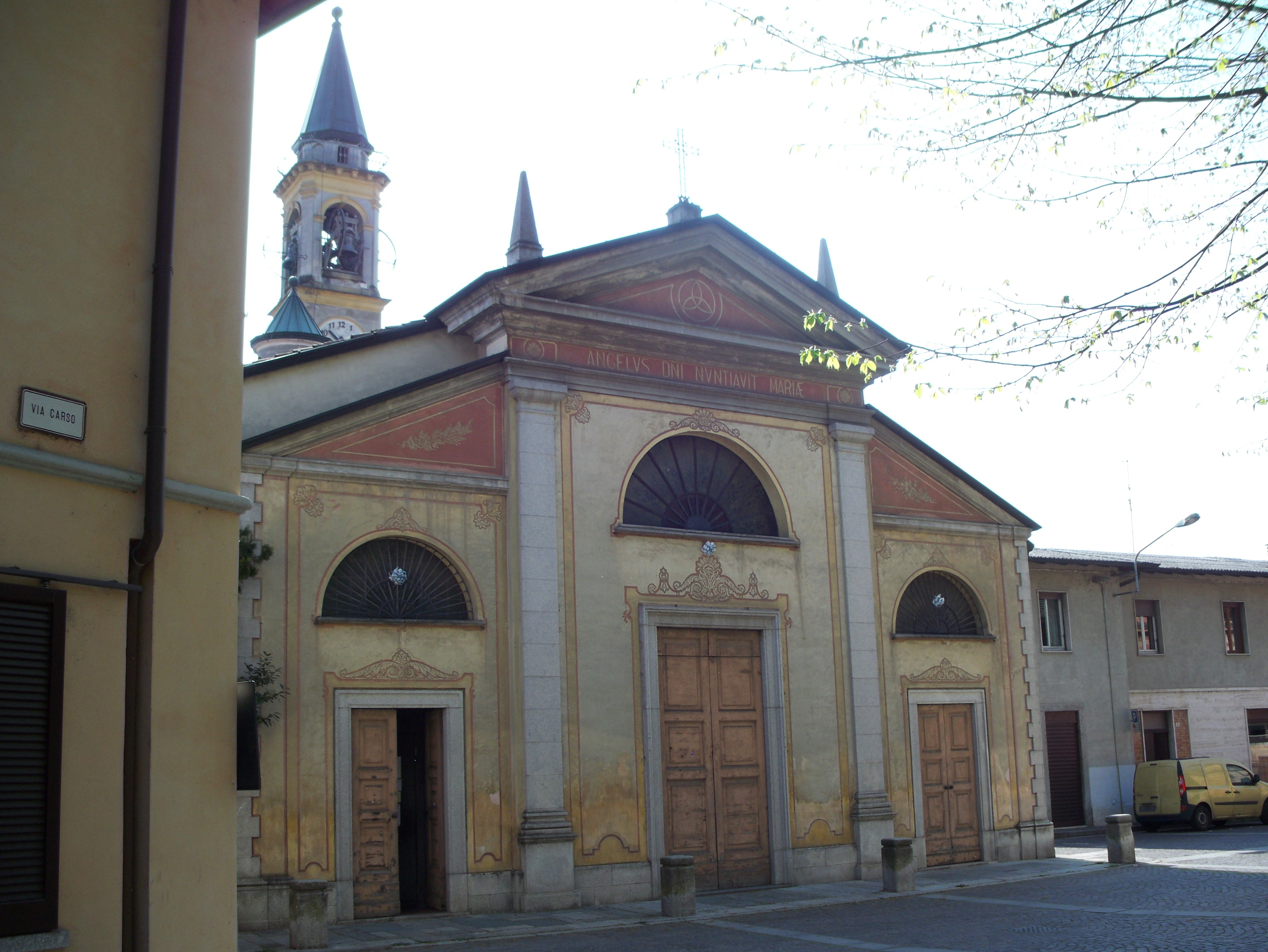 Santuario di Maria Annunciata, Cabiate, CO, Italy